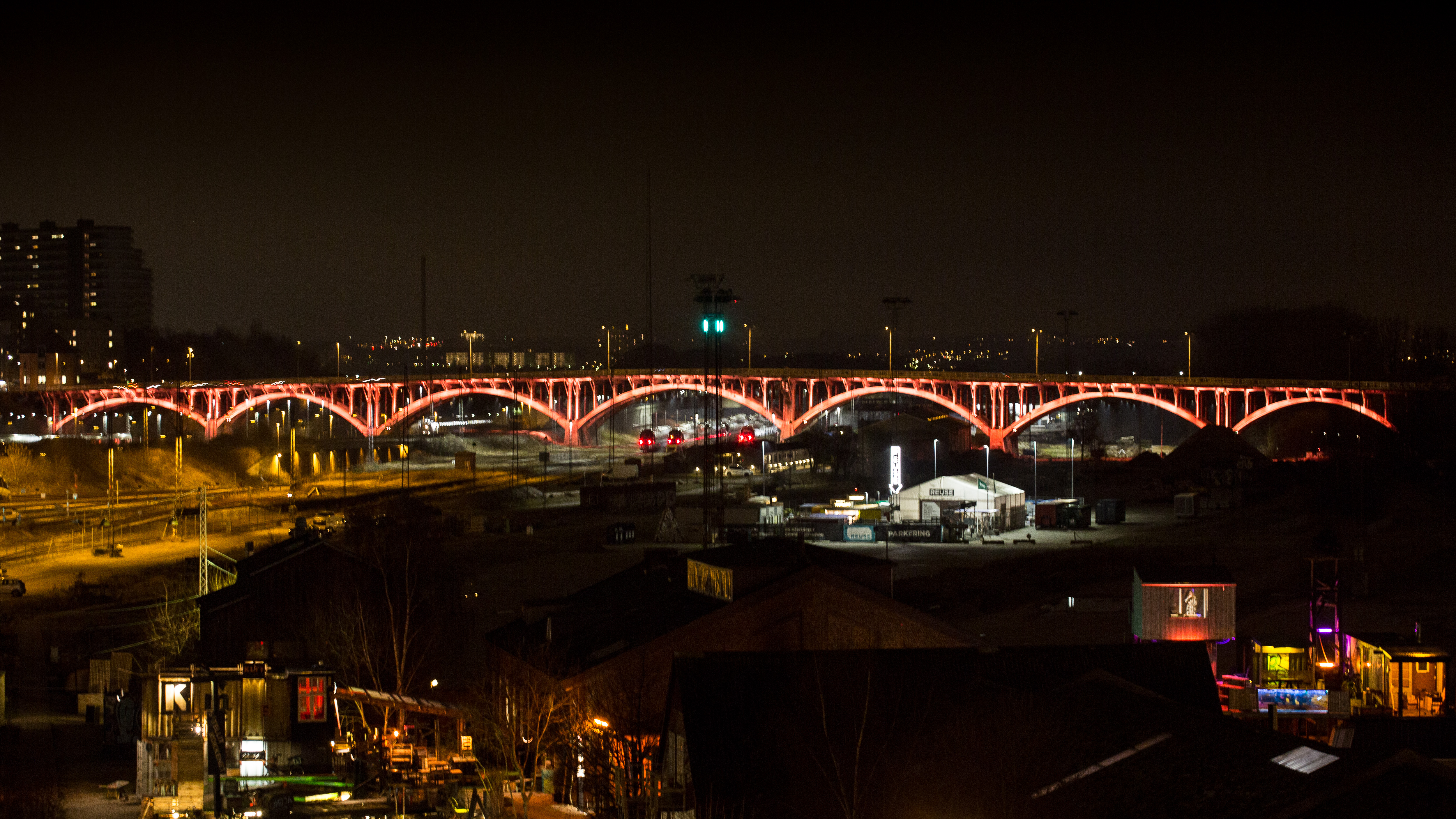 Hesitation of Light set fra Godsbanens tag taget af Michael Harder